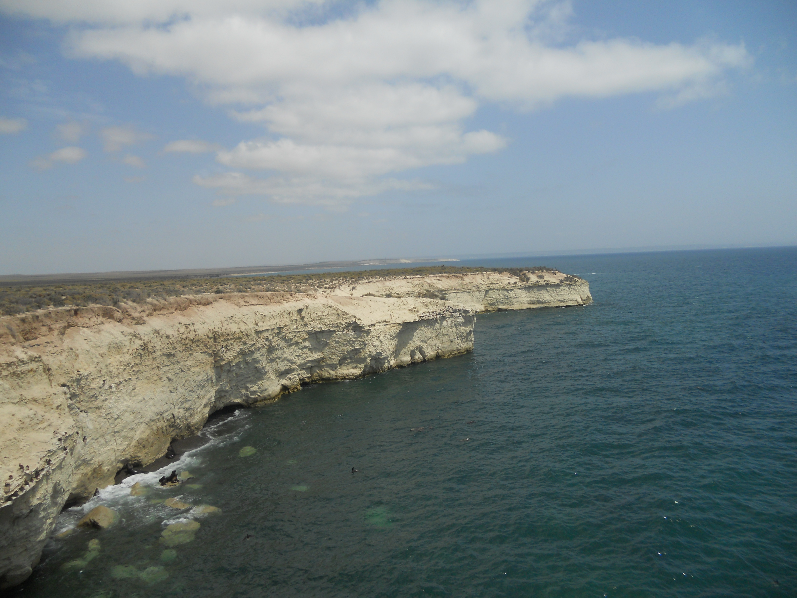 Punta Loma es un lugar ubicado a unos pocos kilómetros de la ciudad de Puerto Madryn en la provincia de Chubut, al sur de Argentina. Allí en época de diciembre, enero y febrero se podrá disfrutar el espectaculo del comportamiento de los lobos marinos en su habitad. Es una experiencia muy linda y super recomendable!